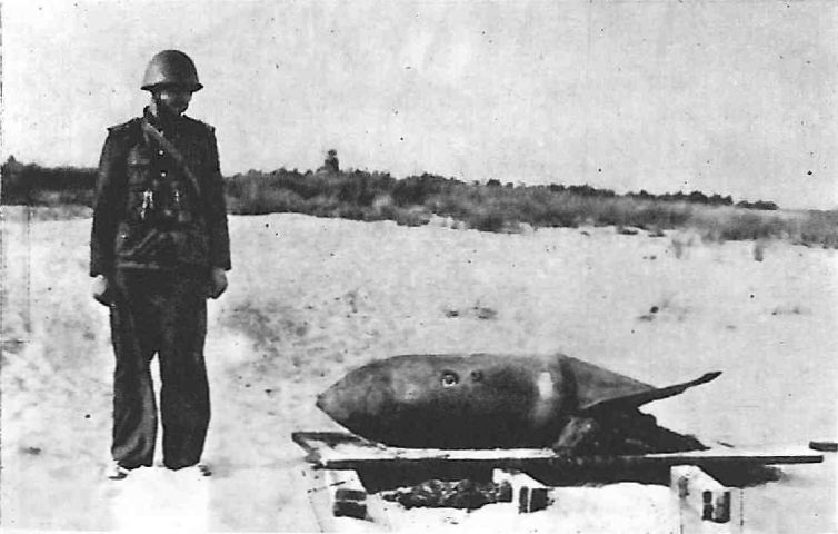 Kpt. mar. Zbigniew Przybyszewski przy niewypale niemieckiej bomby lotniczej na Helu, 1939 r.